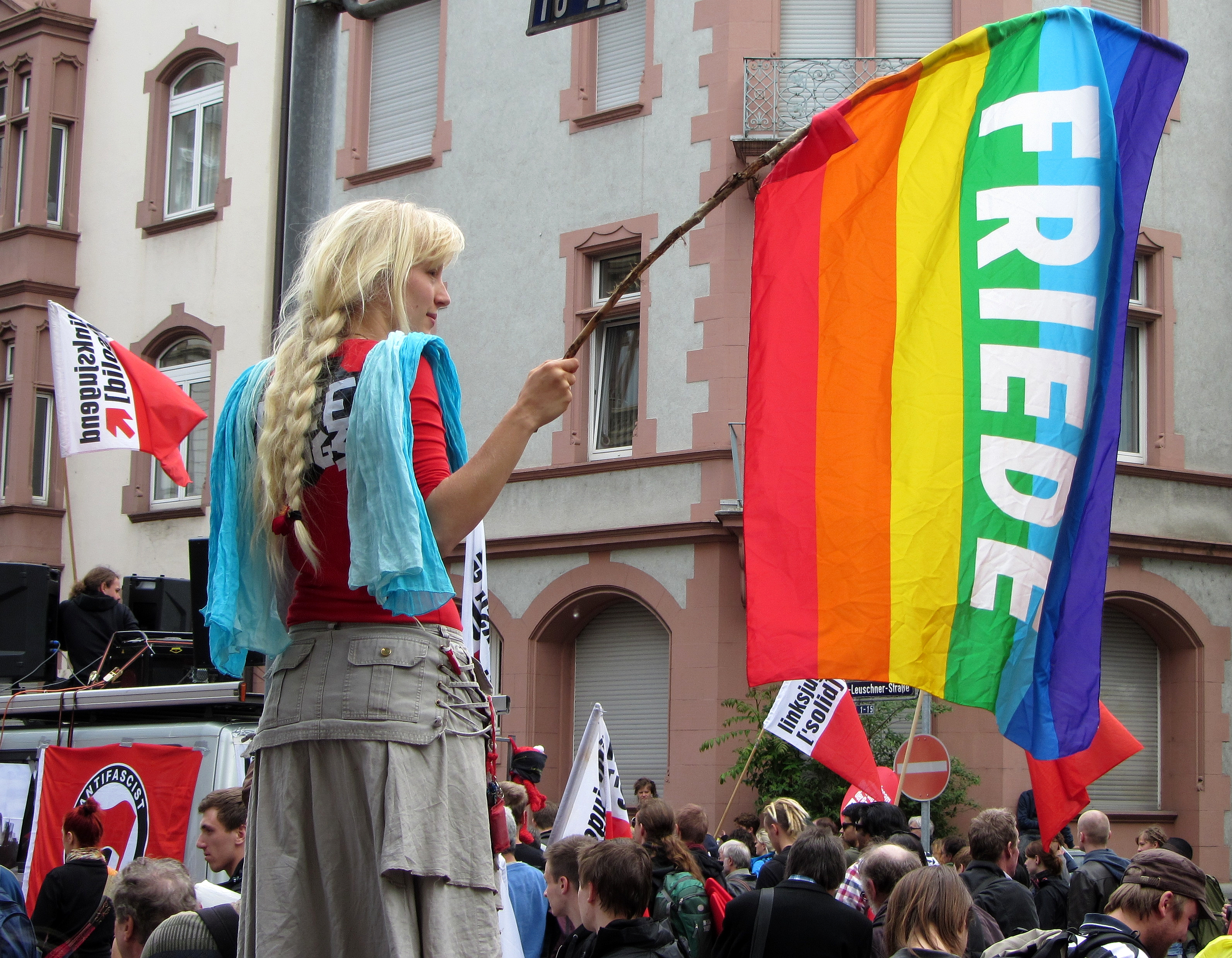 Blockupy 2013: „Pace“-Fahne.